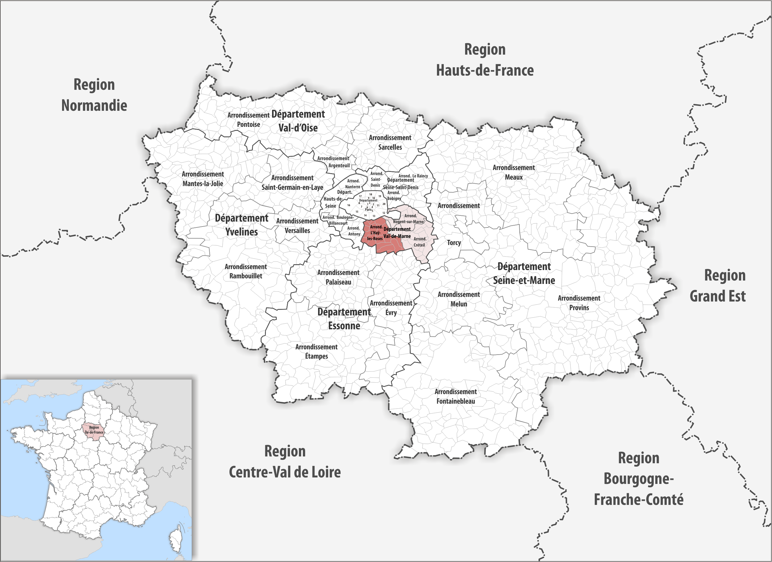 Lage des Arrondissements L’Haÿ-les-Roses